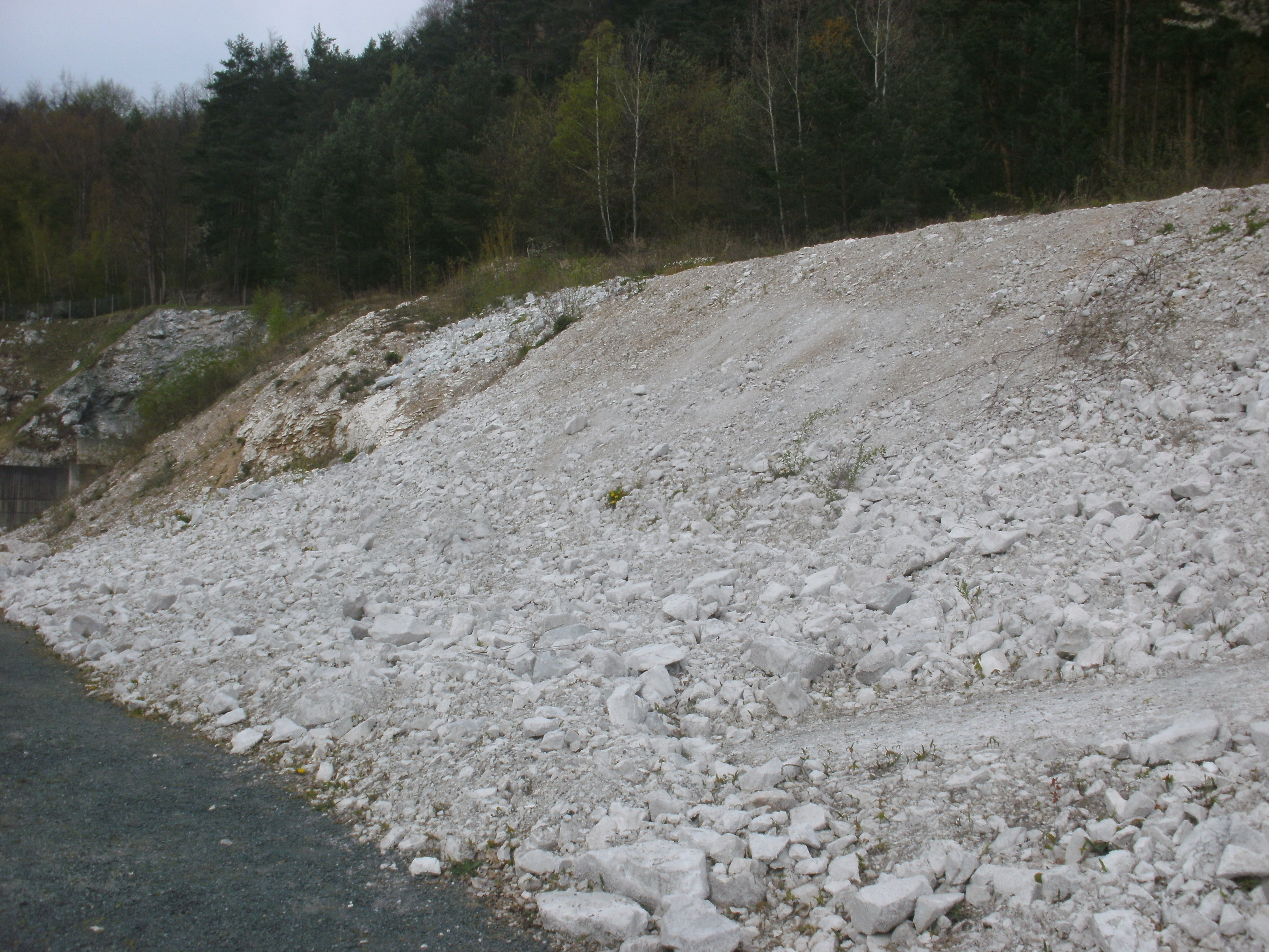 Zufahrtsstraße zur KZ-Gedenkstätte Mittelbau-Dora von Nordhausen/Krimderode; weißes Anhydrit-Geröll des Kohnsteins beim 1947 gesprengten Eingang des Fahrstollens B.